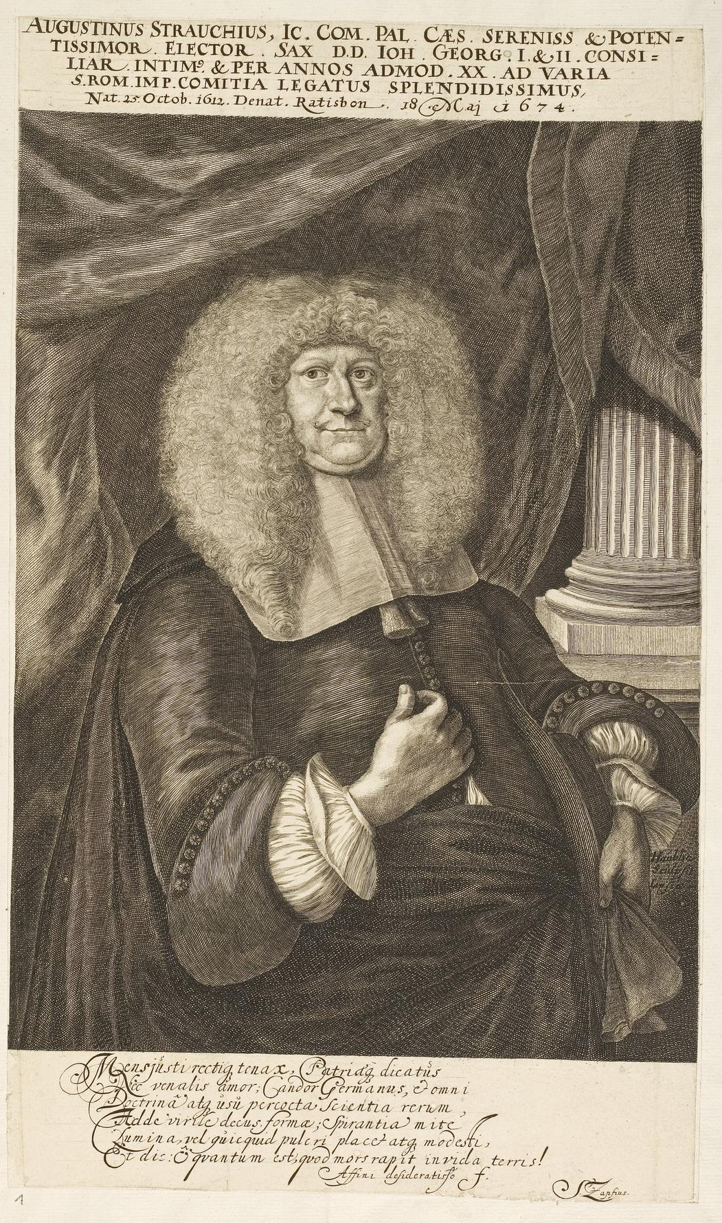 Grafik aus dem Klebeband Nr. 1 der Fürstlich Waldeckschen Hofbibliothek Arolsen Motiv: Augustin Strauch, deutscher Rechtswissenschaftler und sächsischer Diplomat